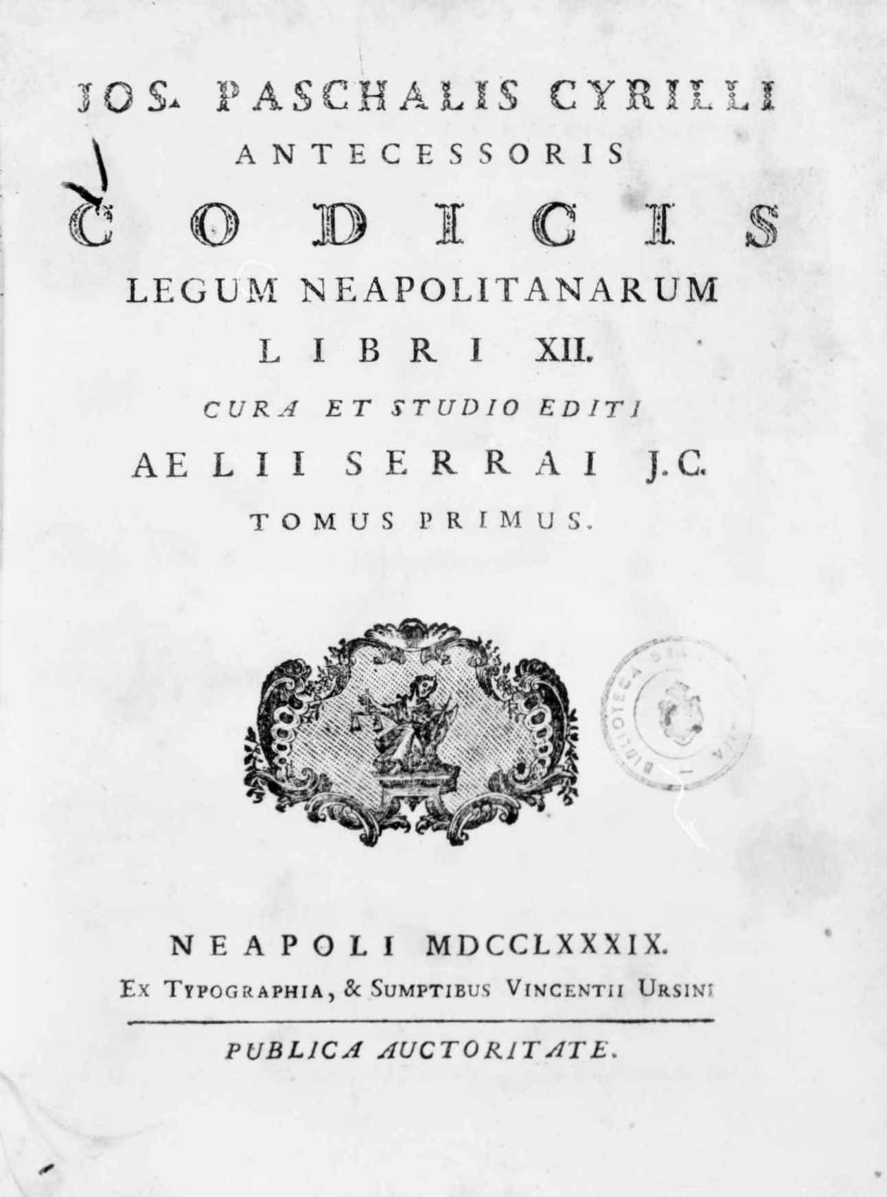 Frontespizio